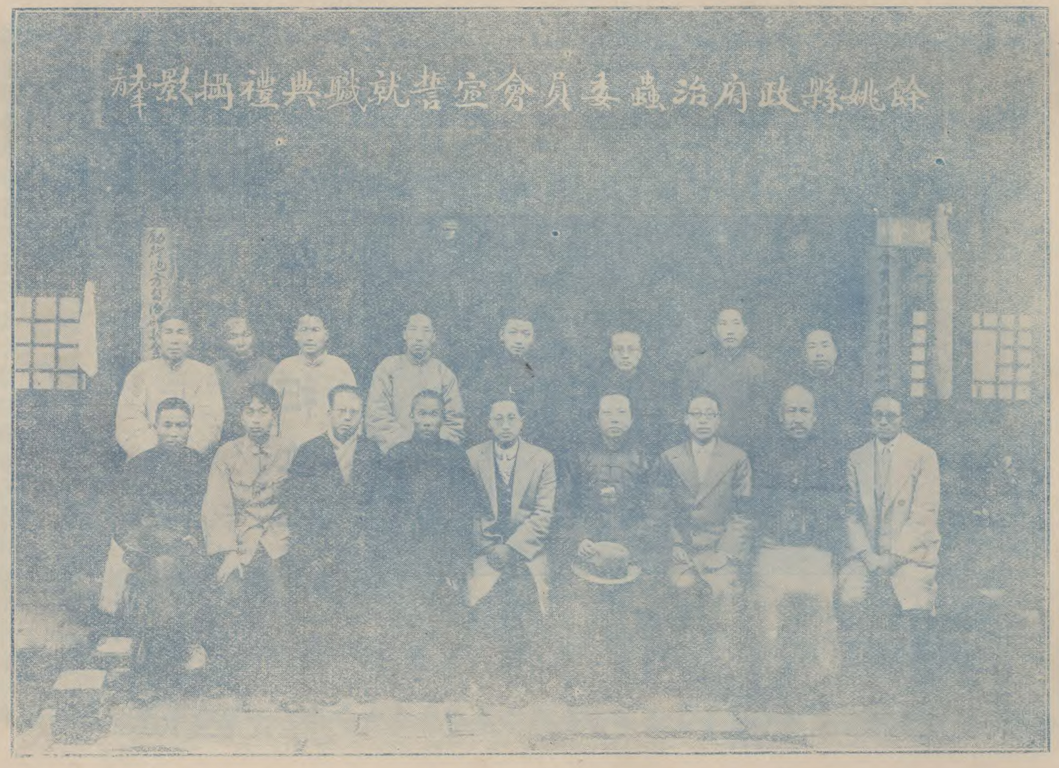 中文（台灣）: 餘姚治虫年報